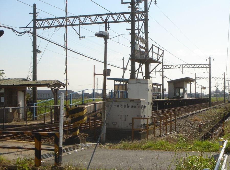 大外羽駅（岐阜県大垣市・養老鉄道養老線（撮影当時は近鉄）） 撮影：投稿者(Monami)、撮影日：2005年11月